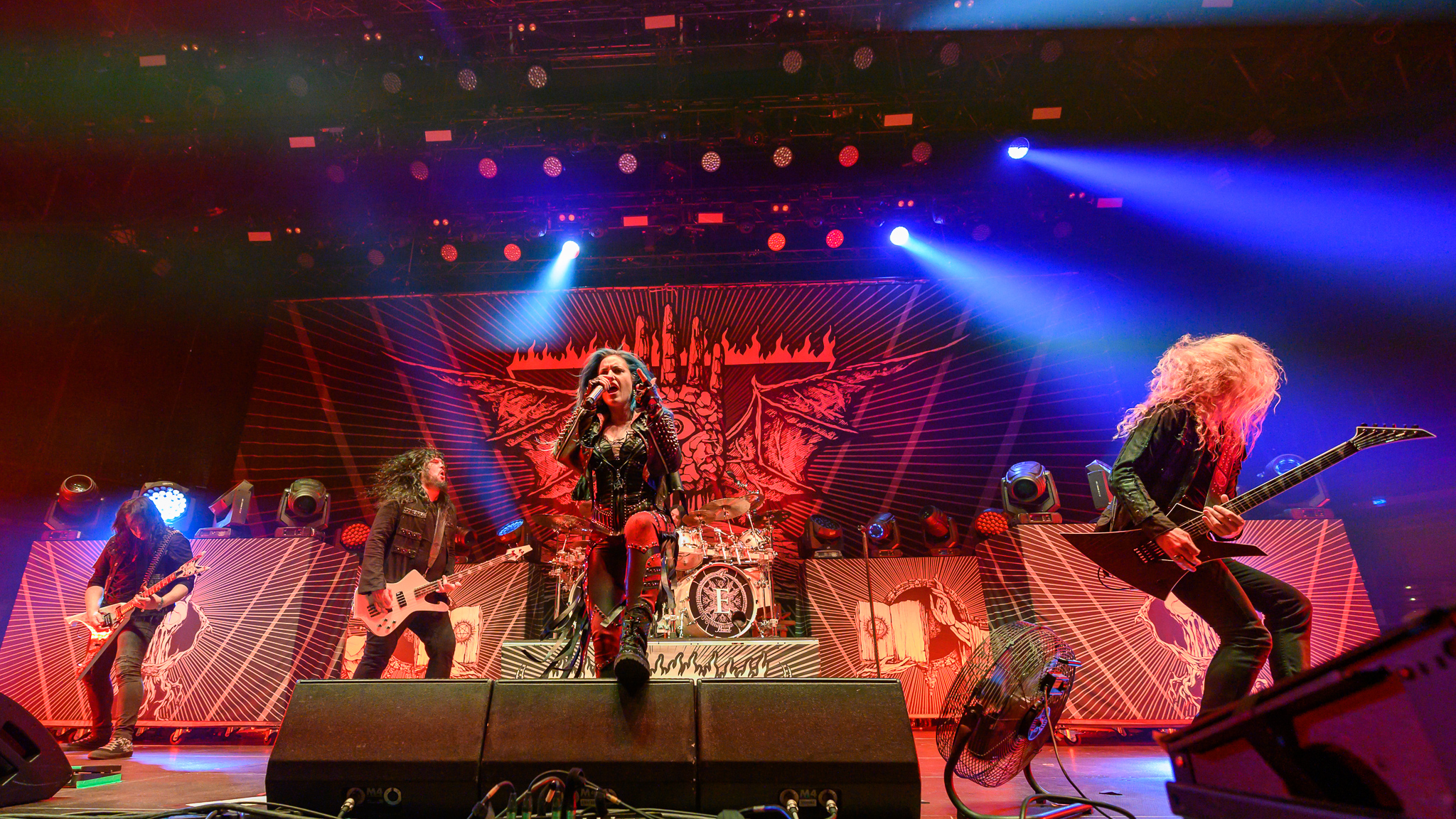 ARGO-Konzerte,Alissa White-Gluz,Alternarena,Arch Enemy,Arena Nürnberger Versicherung,Jeff Loomis,Konzert,Livekonzert,Livemusik,Michael Amott,Musik,RiP,Rock im Park 2019,Sharlee D’Angelo